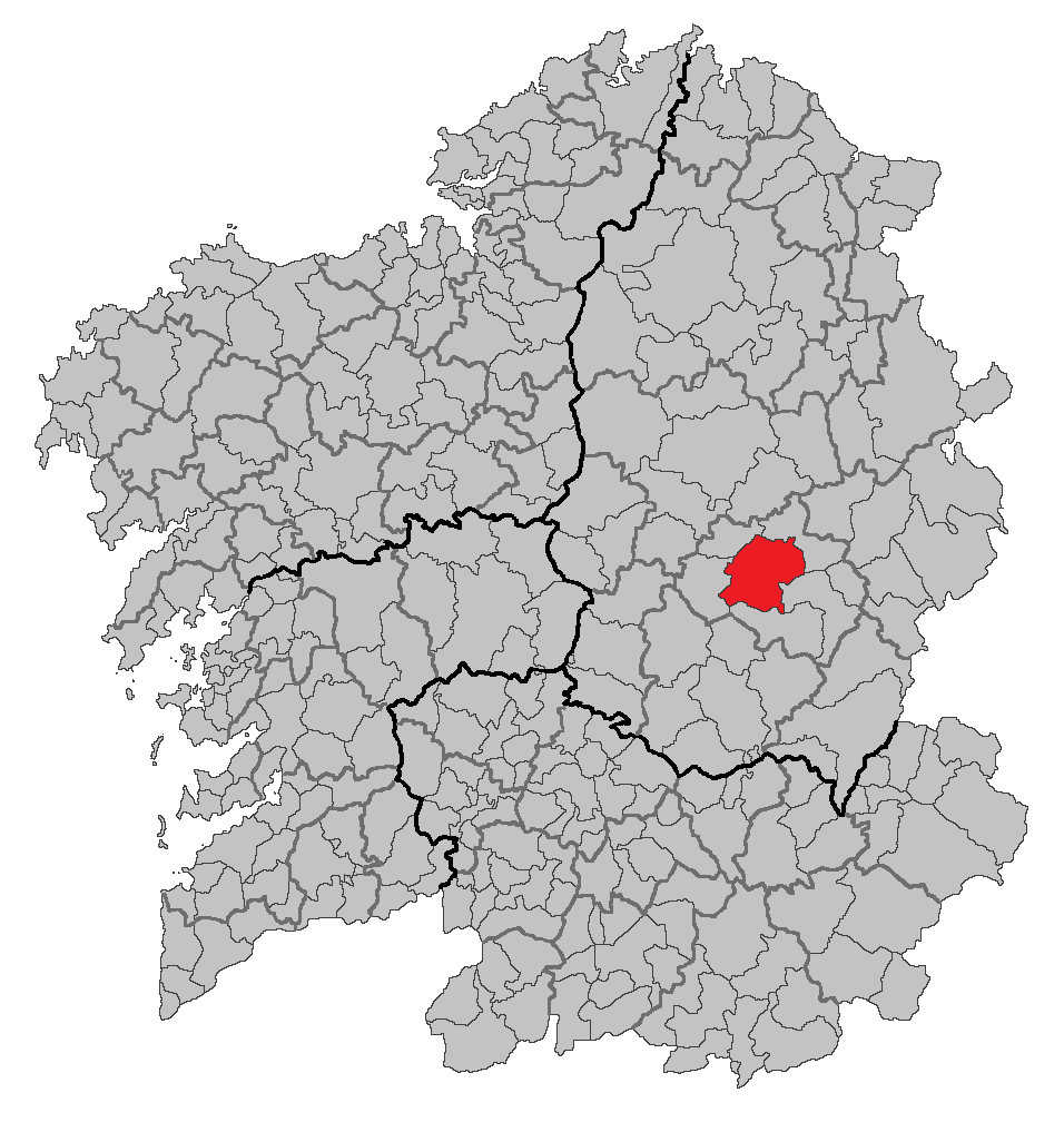 Mapa coa localización do concello de Sarria.